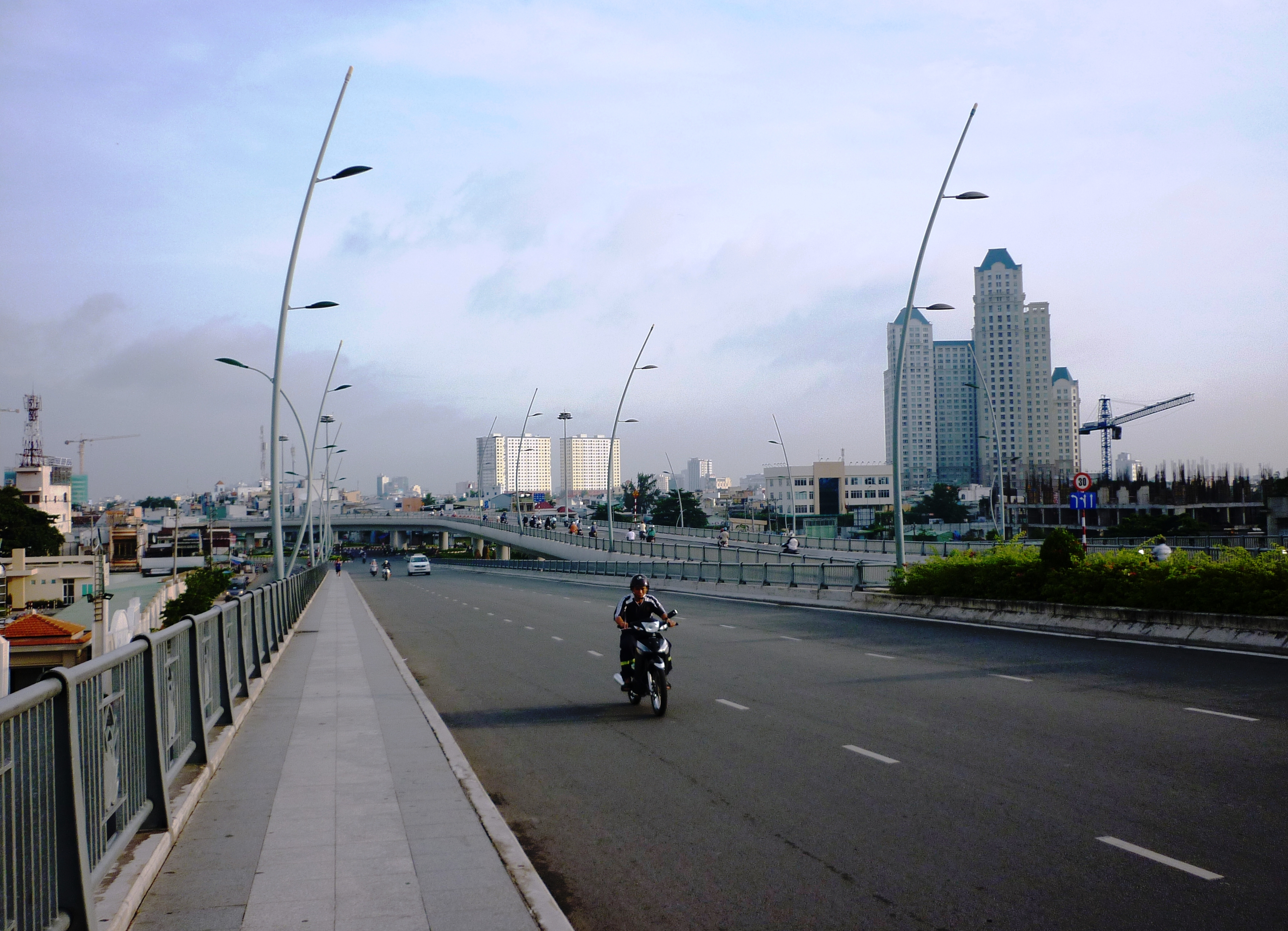 Trên cầu Thủ Thiêm nhìn về quận Bình Thạnh